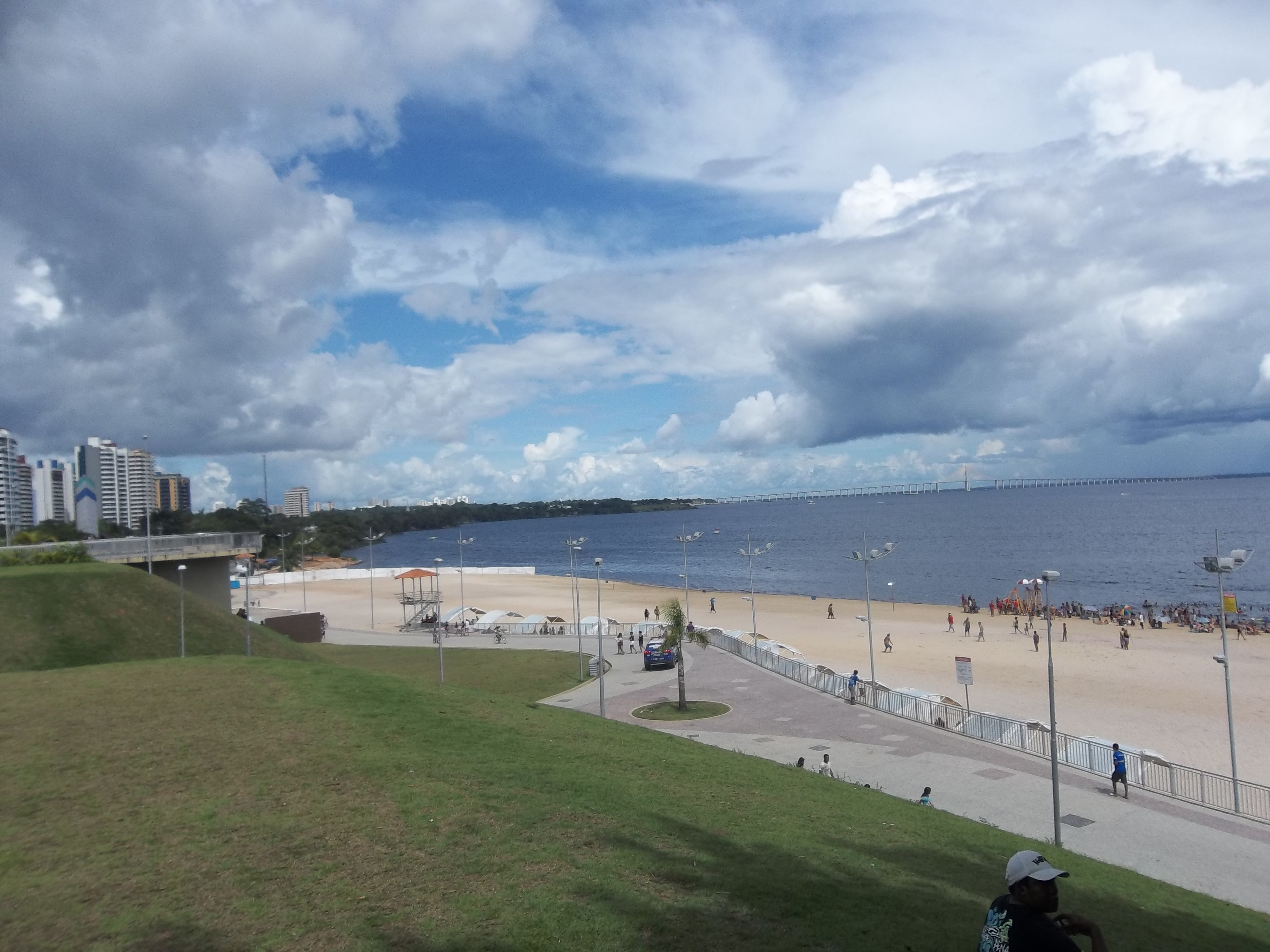 Praia da Ponta Negra, em Manaus, Amazonas, Brasil.